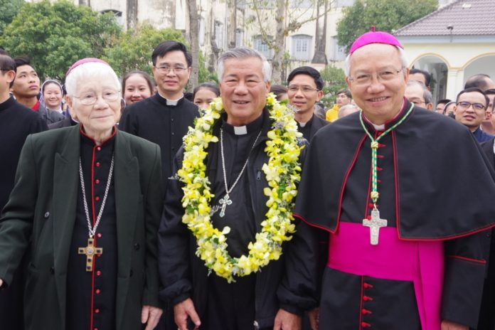 Ba vị giám mục Giáo phận Vinh, Phaolô Maria Cao Đình Thuyên, Anphongsô Nguyễn Hữu Long, Phaolô Nguyễn Thái Hợp